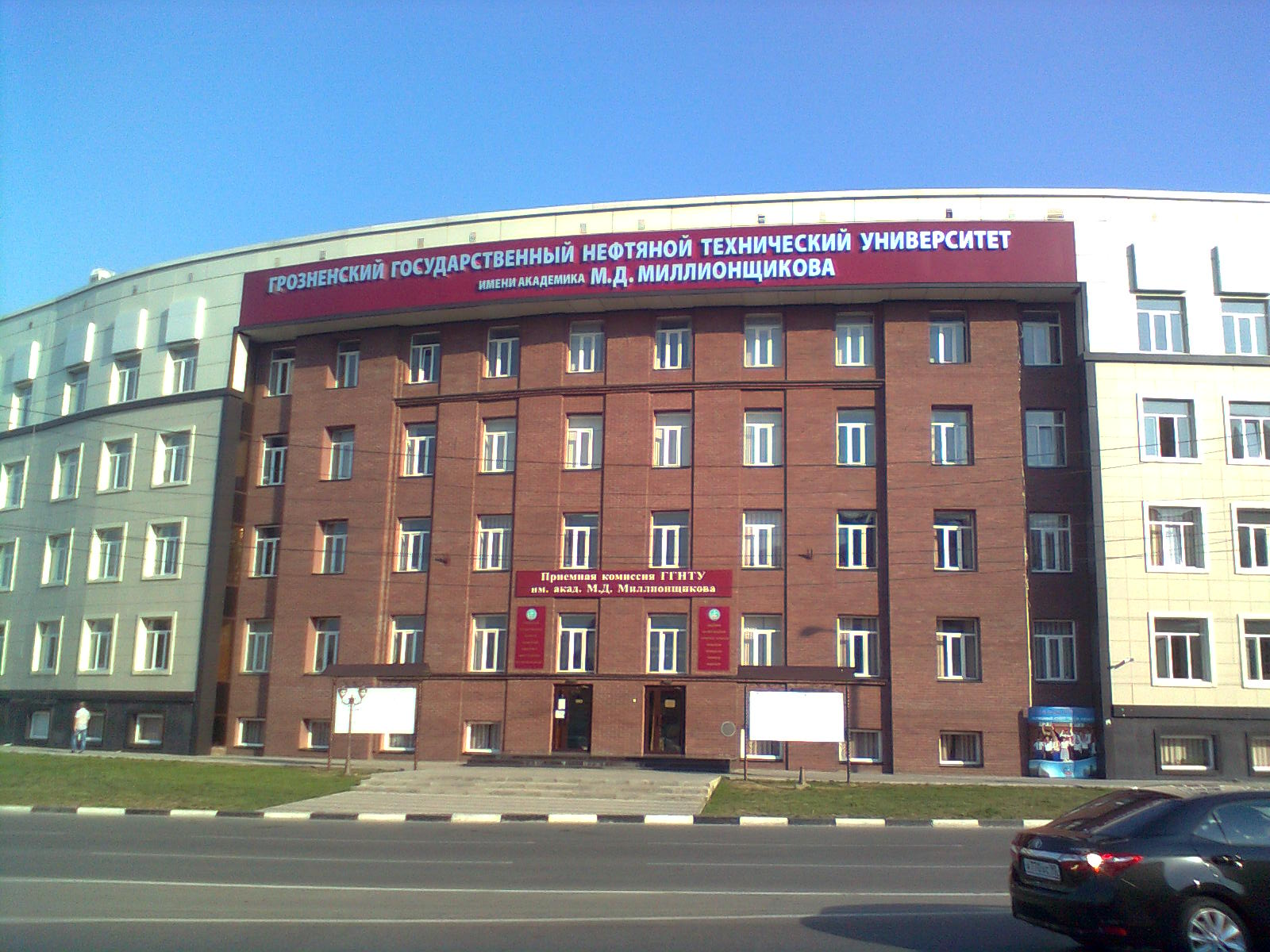 Грозненский нефтяной университет